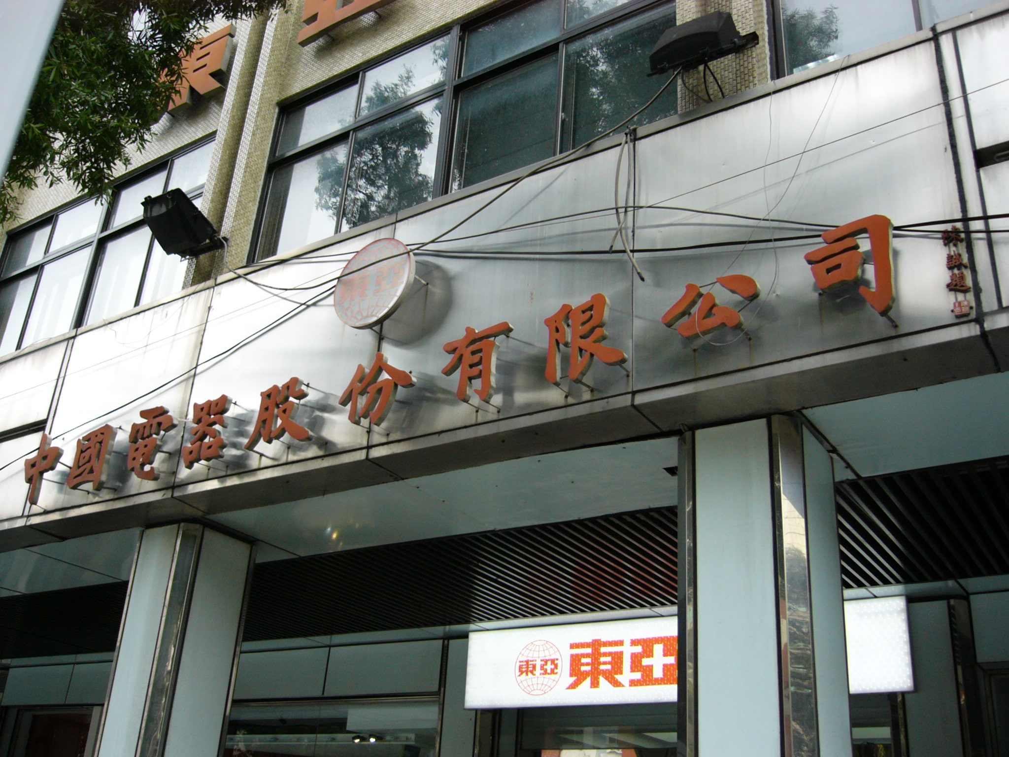 中國電器公司總部大門上方外牆的陳誠題字鑄字招牌，2018年4月拆除。